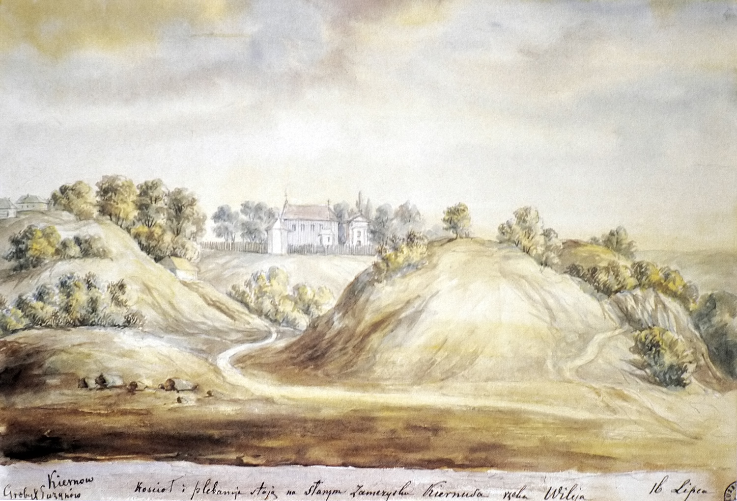 Беларуская (тарашкевіца): Кернаў (Kiernaŭ)